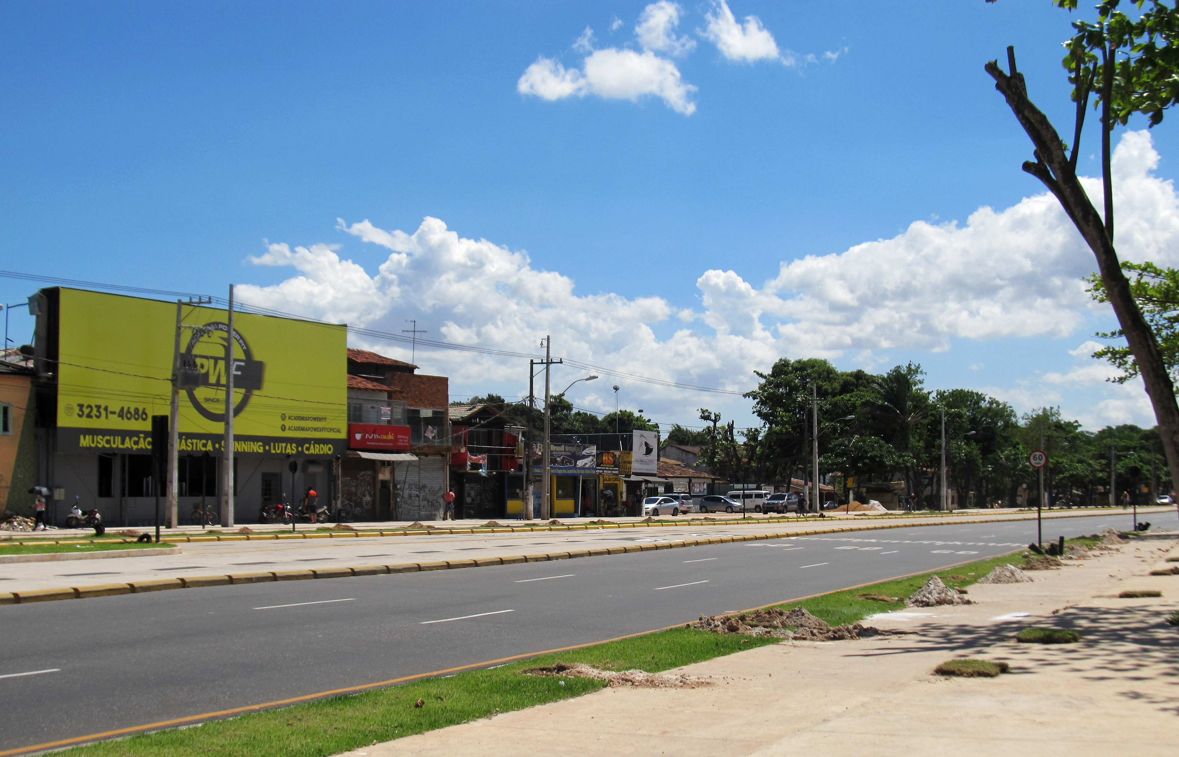 Avenida Augusto Montenegro, trecho no bairro da Marambaia.